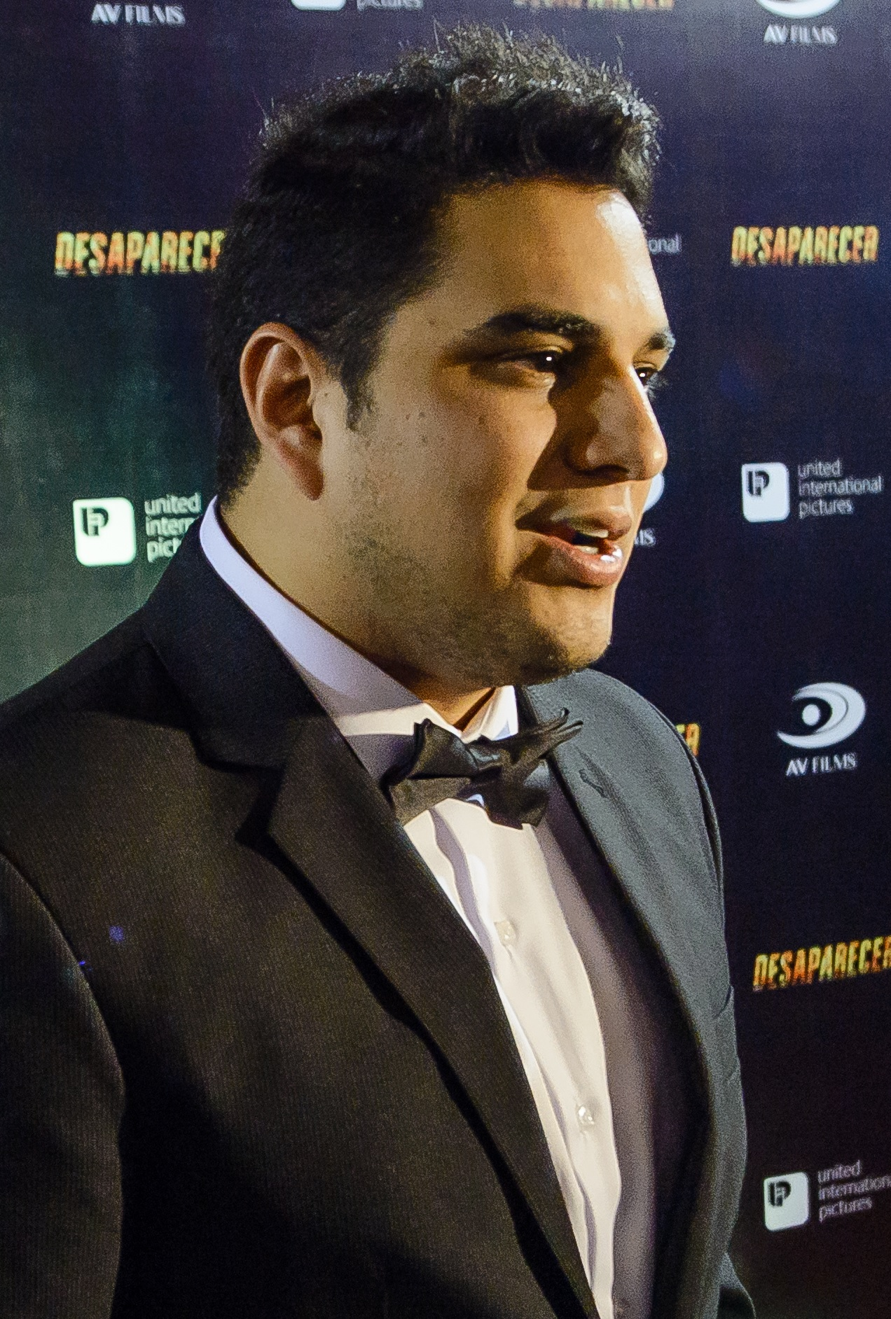 Dorian Fernández-Moris en el avant premiere de Desaparecer.